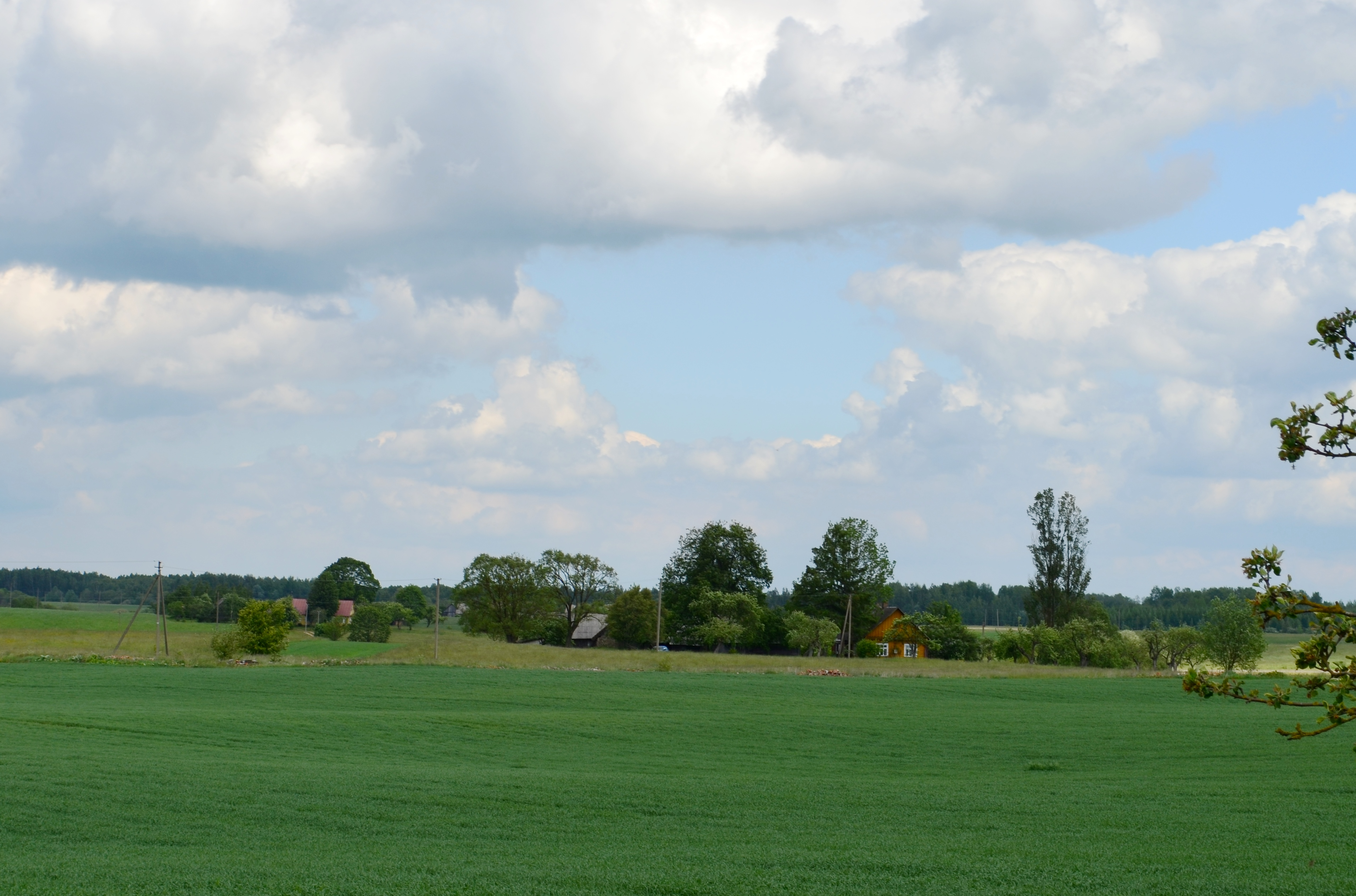 Levaniškiai, Anykščių raj.